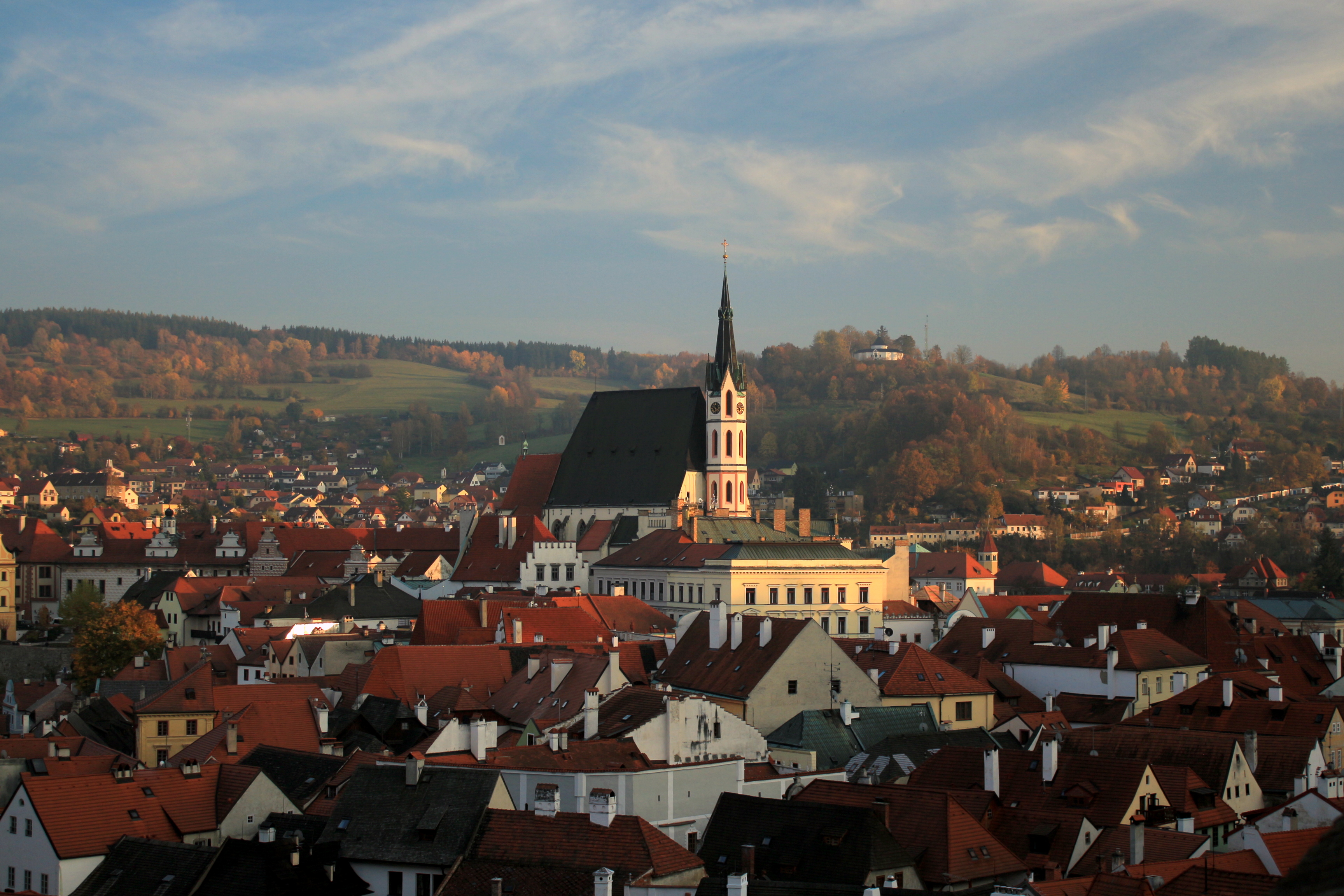 Český krumlov - panorama města